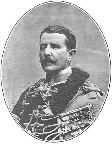 D. José Cavalcanti de Alburquerque, Teniente Coronel de Artillería, que cargó en Melilla al frente de las secciones del escuadrón de Alfonso XIII, obra del fotógrafo Kaulak